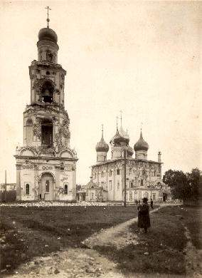 Успенский собор в Ярославле после подавления Ярославского восстания 1918 г.